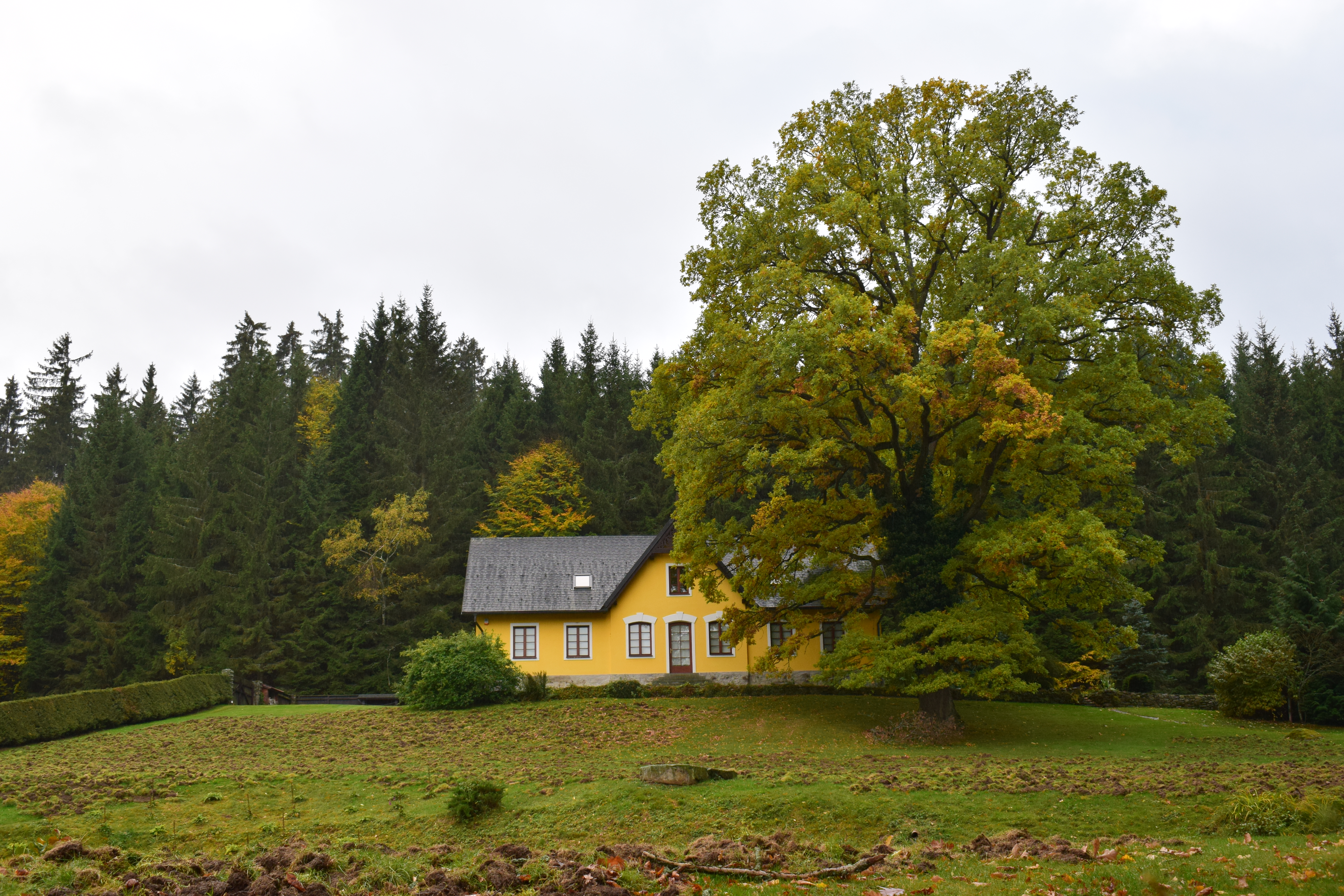 Pohled na dům čp. 23 u Javorů.